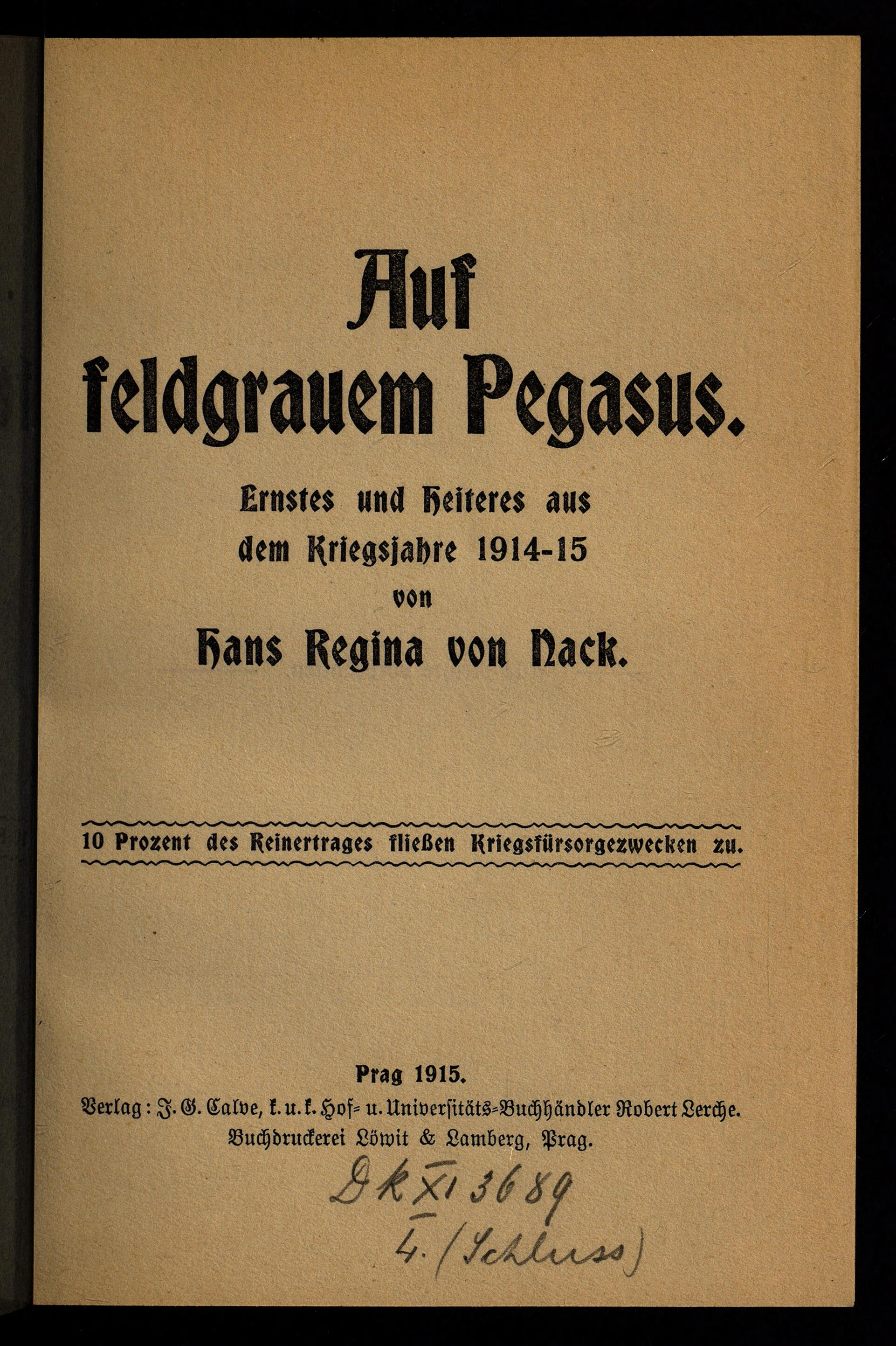 Hans Regina von Nack Auf feldgrauem Pegasus : Ernstes und Heiteres aus dem Kriegsjahre 1914-15. Prag : J. G. Calve, 1915